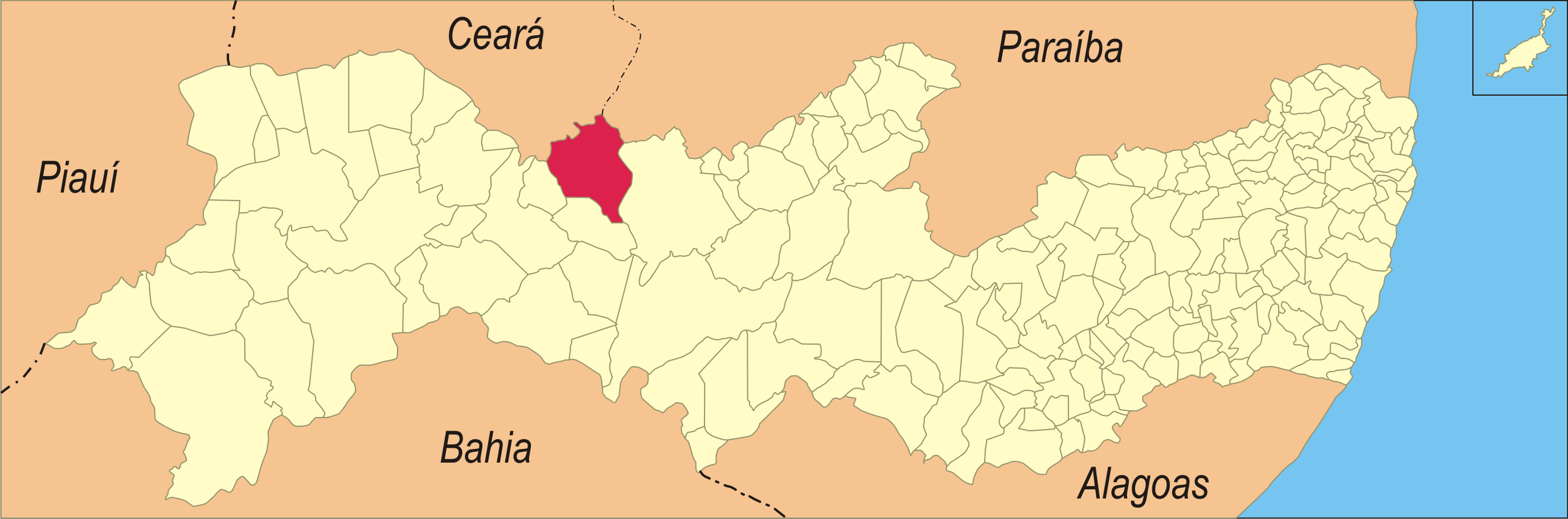 Localização da cidade em Pernambuco